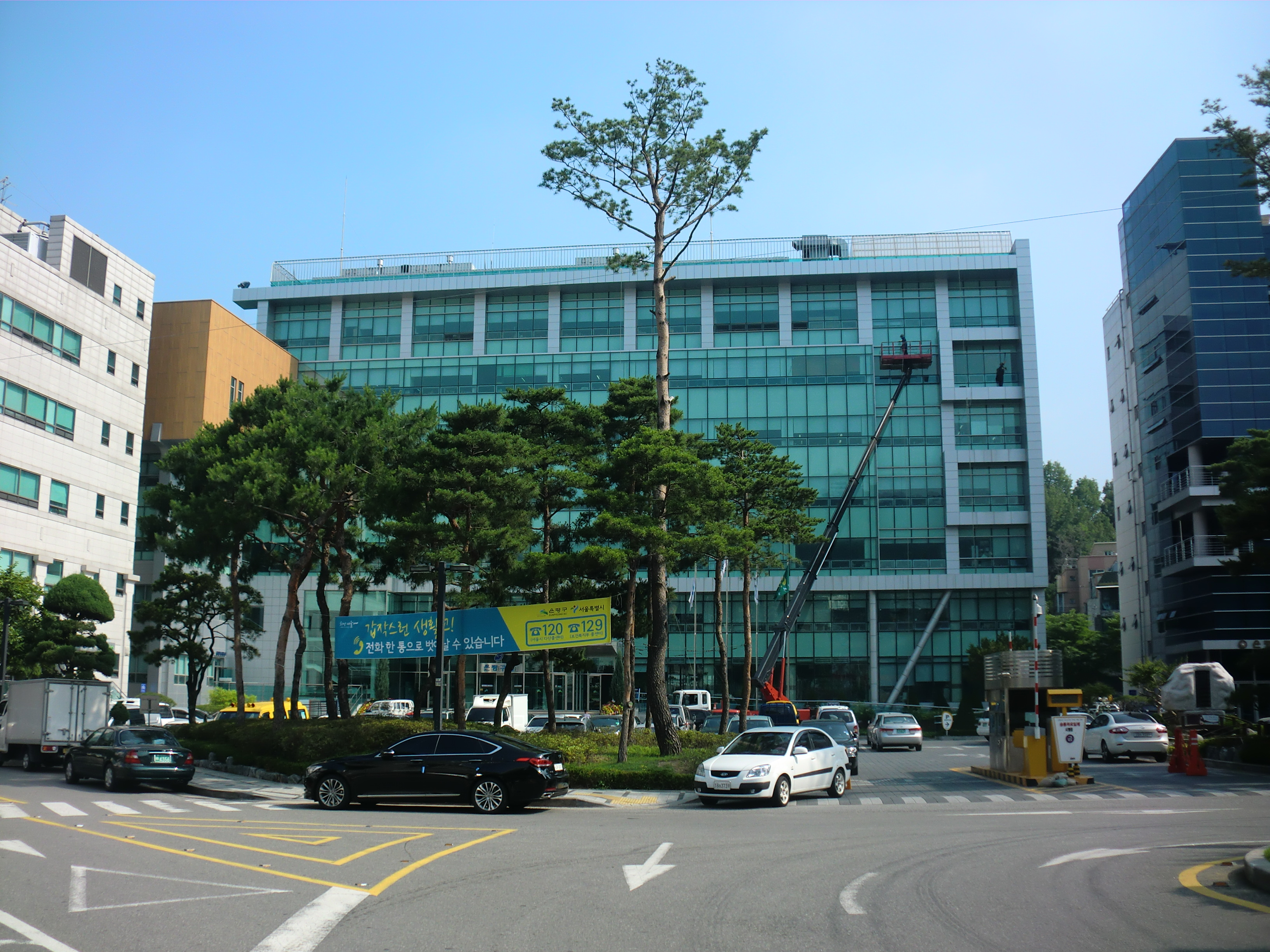 서울특별시 은평구에 있는 은평구청